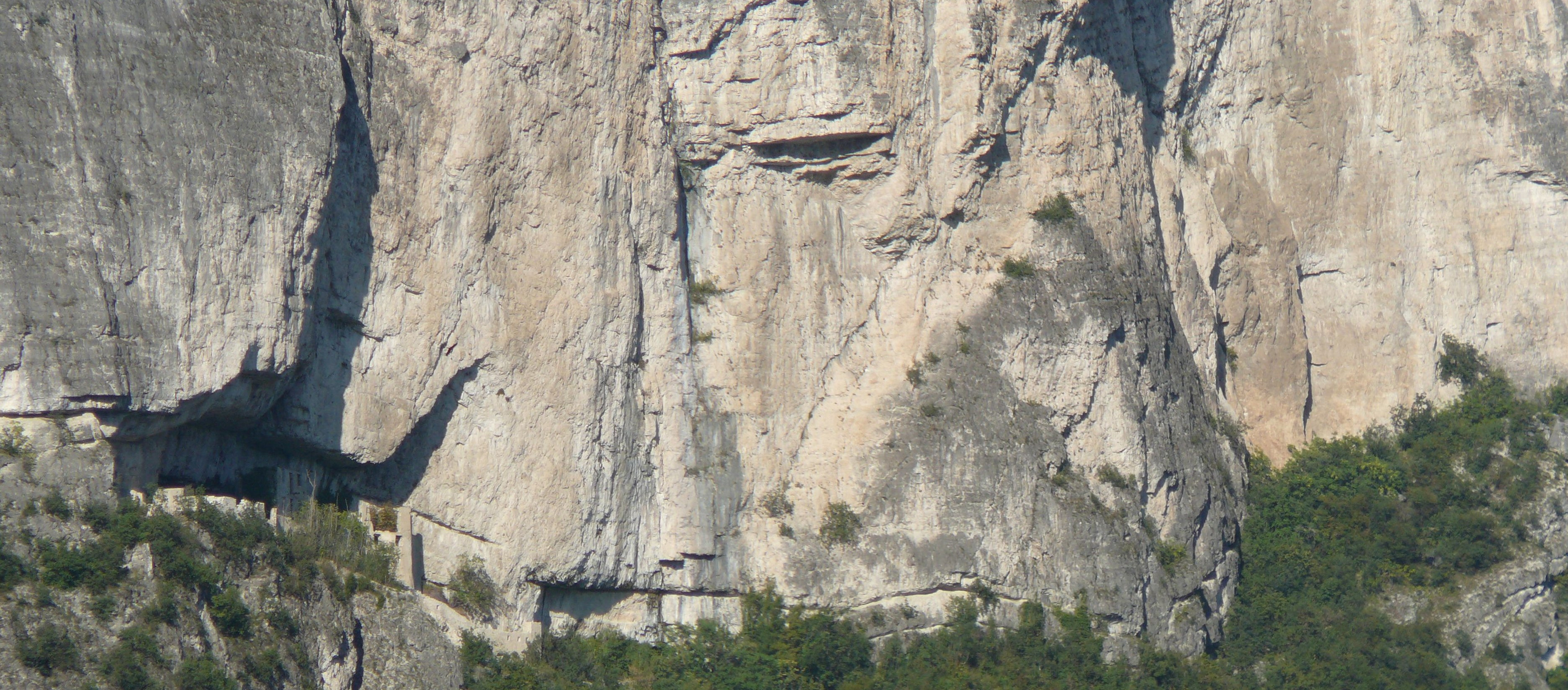 Rovine di Castel San Gottardo, presso Mezzocorona